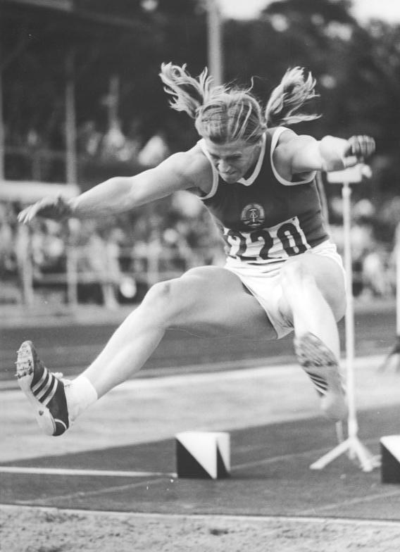 Burglinde Pollak ADN-ZB Demme 20.7.75 Barcelona: DDR-Fünfkämpferinnen siegreich. Beste der Einzelwertung bei der Vorrunde im Leichtathletik-Europapokal im Mehrkampf wurde am 19.7.75 in Barcelona die Potsdamerin Burglinde Pollak (hier beim Weitsprung-Foto von einem frühren Wettkampf) mit 4571 Punkten. Als Pokalverteidiger bereits für das Finale am 6.-7.9.1975 in Bydgoszoz qualifiziert, siegten die DDR-Mädchen (Burglinde Pollka-Sigrun Thon-Christine Laser) überlegen mit insgesamt 13558 Punkten vor Frankreich (12735) und Großbritannien (12302) .